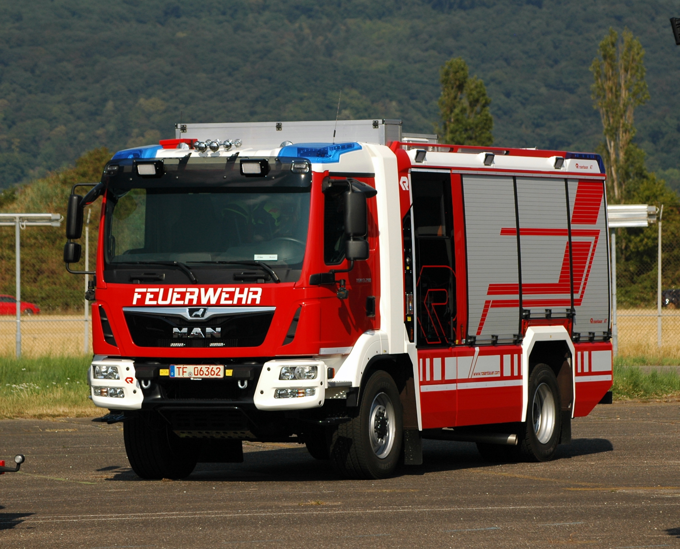 Heidelberg Airfield - MAN TGL